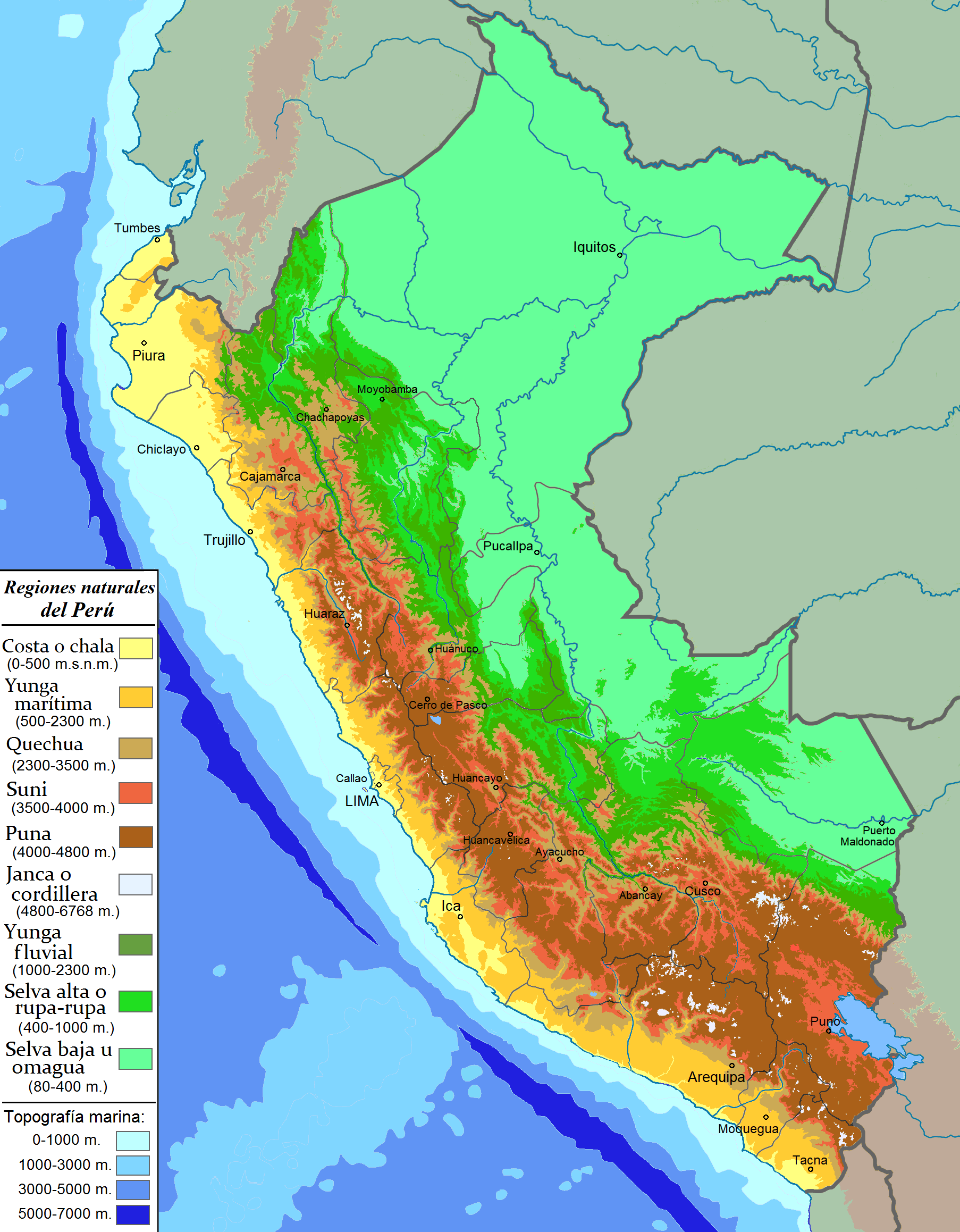 Mapa de las regiones naturales y altitudinales del Perú, de acuerdo con los parámetros de Javier Pulgar Vidal (1938).